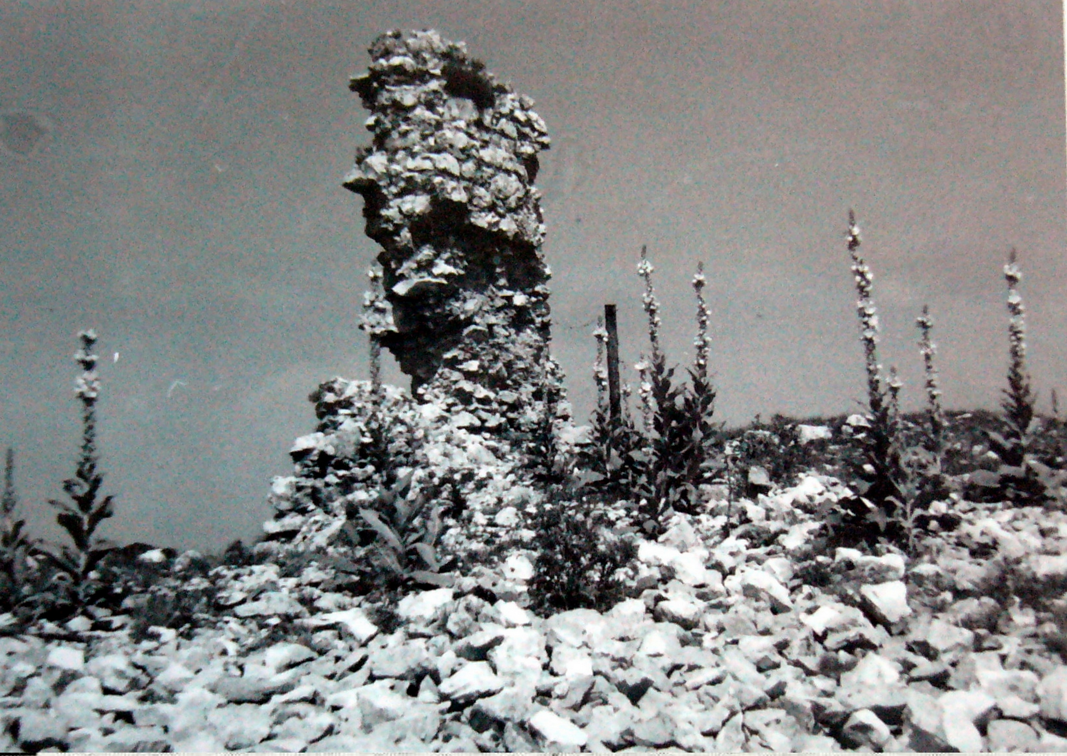 Poslednji "stolp" gradu Šilentabor na Pivškem.